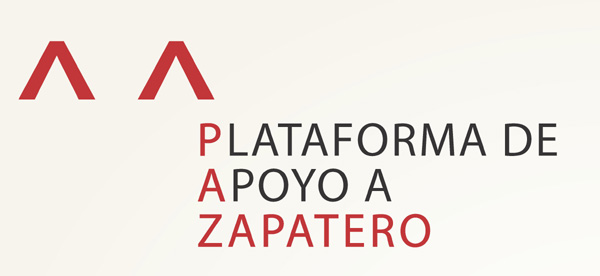 Logotipo de la Plataforma de Apoyo a Zapatero. Imagen libre de copyright.